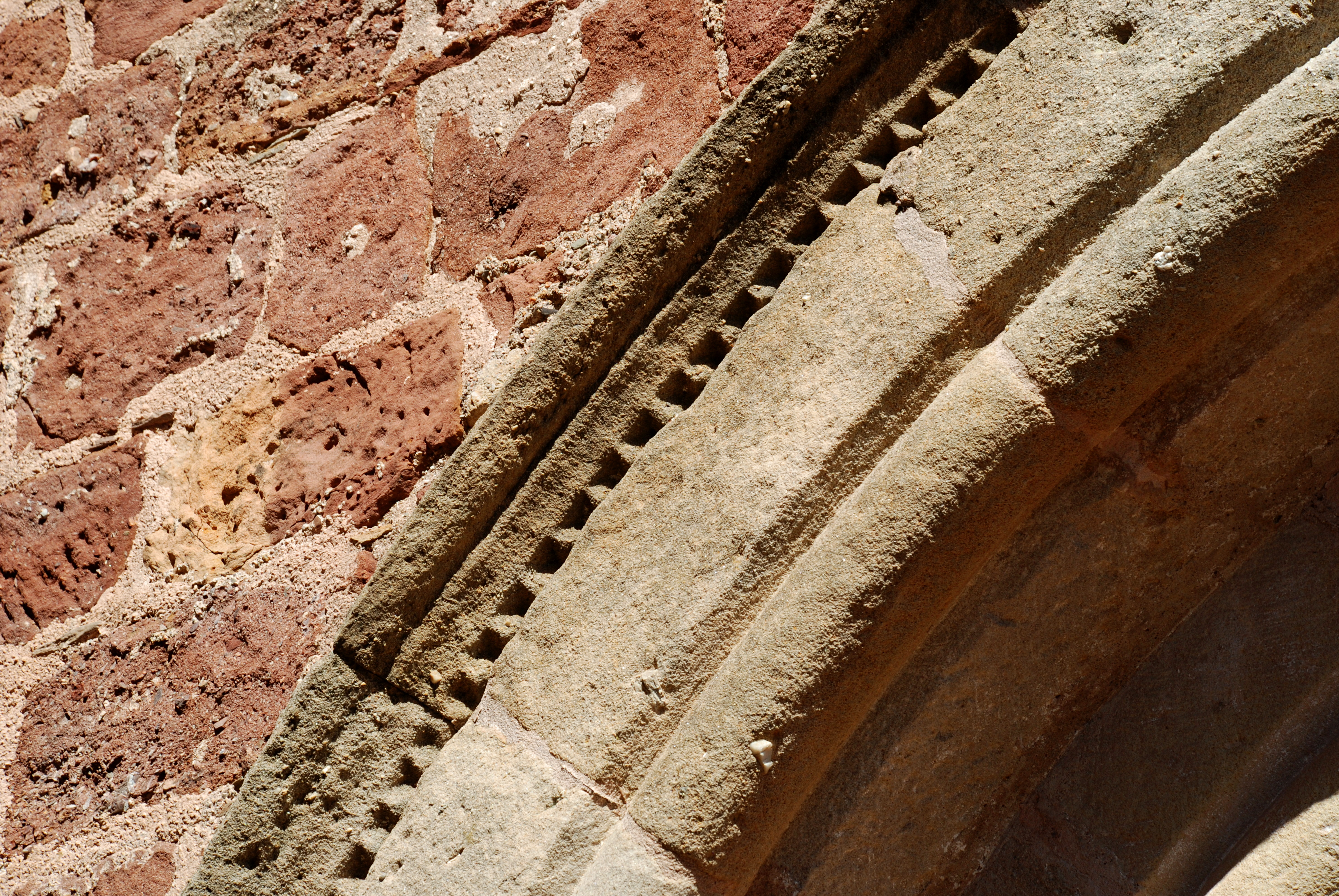 France - Languedoc - Hérault - La Tour-sur-Orb - Église Sainte-Marie de Frangouille